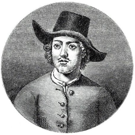 Greate embassy of Peter I in Europe in 1697-98. Combined engravings by Marcus. Великое посольство Петра I в Европу (1697-98 гг.). Справа портрет Петра в одежде матроса во время его пребывания в голландском Саардаме. Гравюры Маркуса.